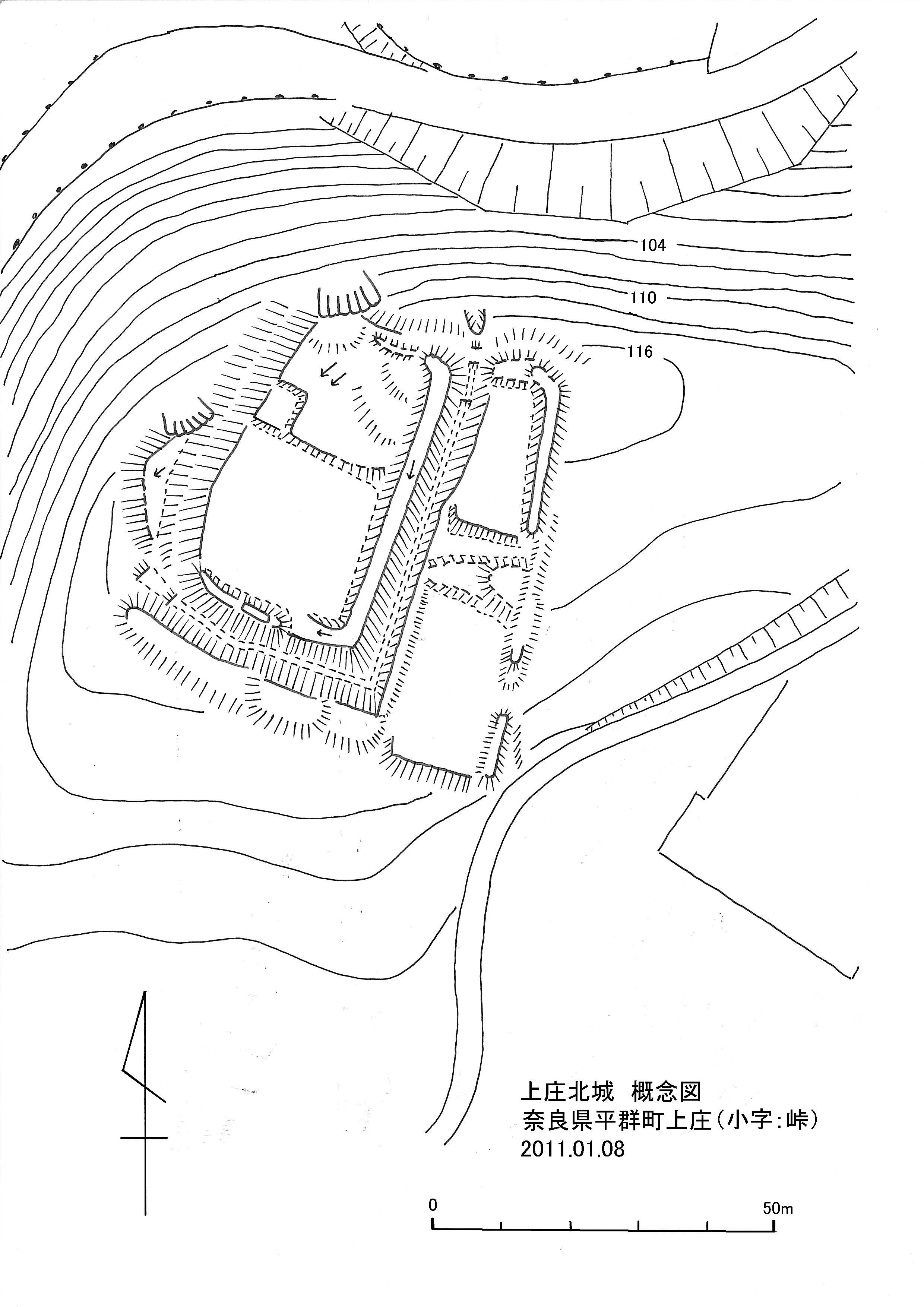 上庄北城の概念図です。今後再調査にて新しく更新されていく可能性があります。